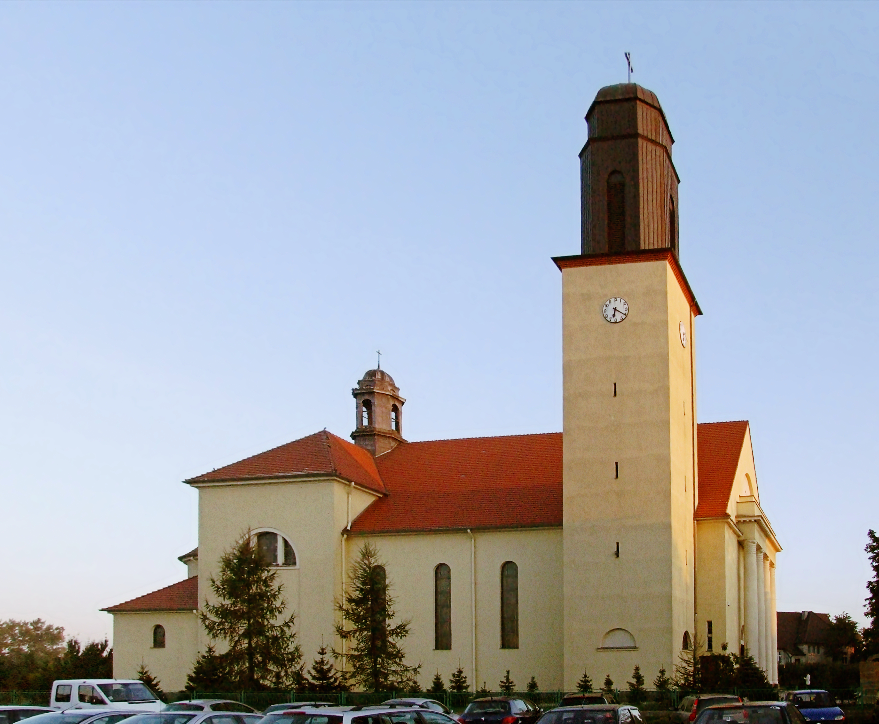 Gołańcz, kościół p.w. św. Wawrzyńca, ul. Libelta, 1931-34 r.